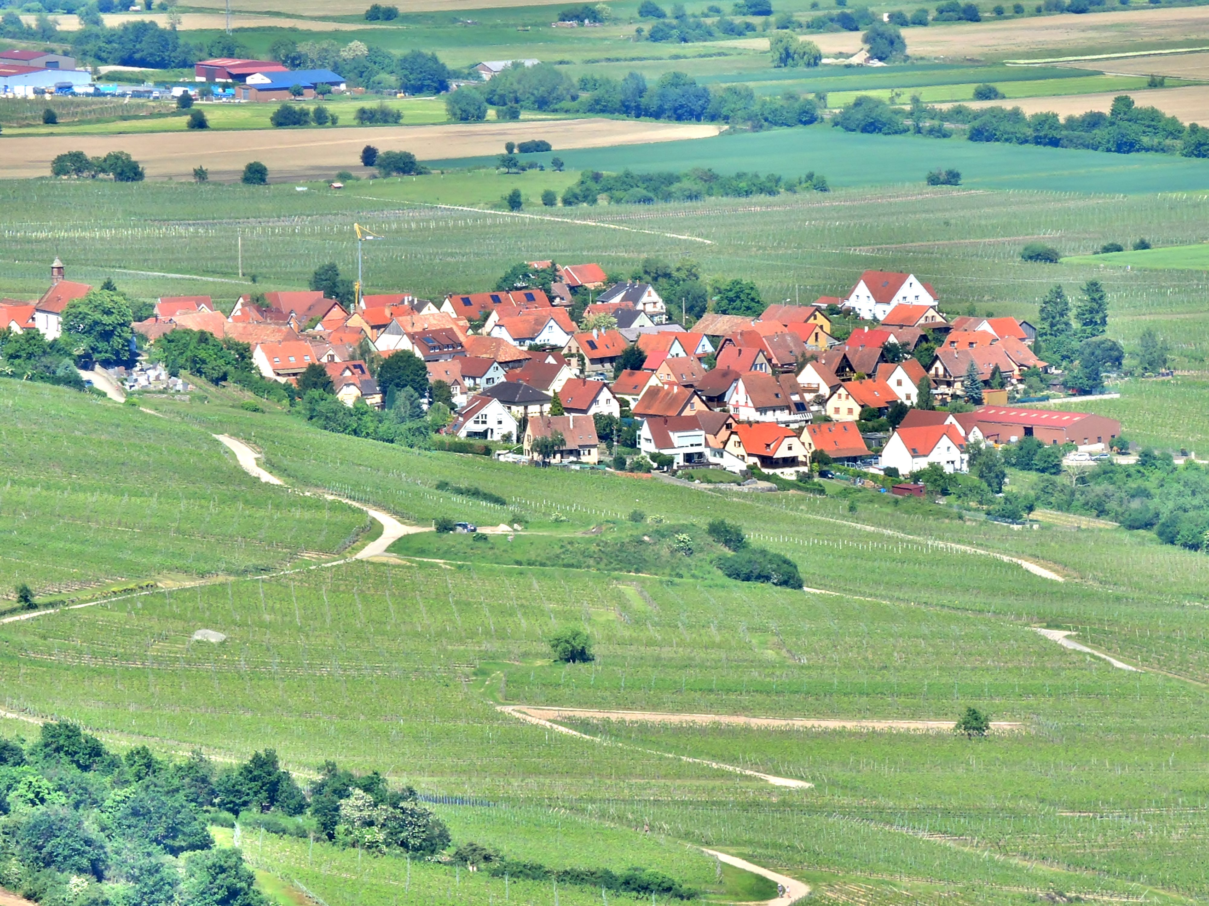 Village de Dieffenthal, vu des ruines du château de l'Ortenbourg. Bas-Rhin.